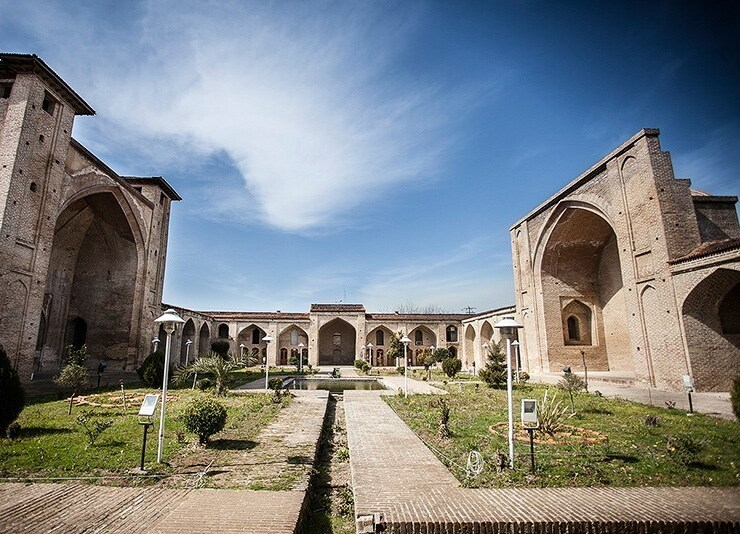 مازِرونی: فرح آباد ساری